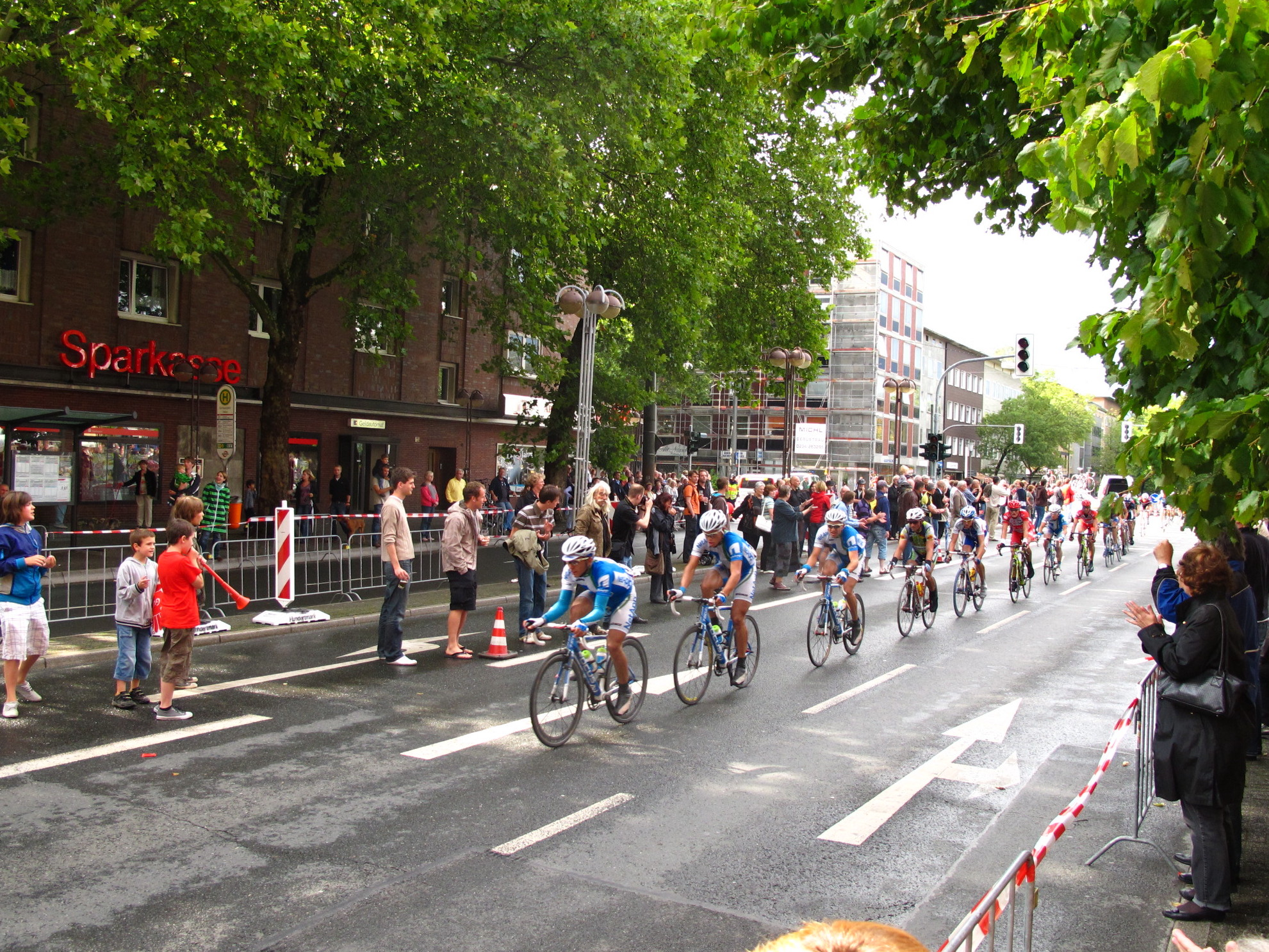 Sparkassengiro 2010 (Männer) Königsallee höhe Schauspielhaus Richtung Stiepel